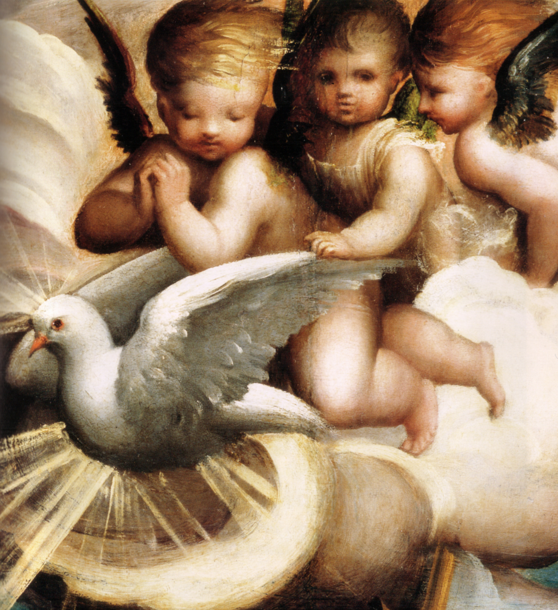 detail